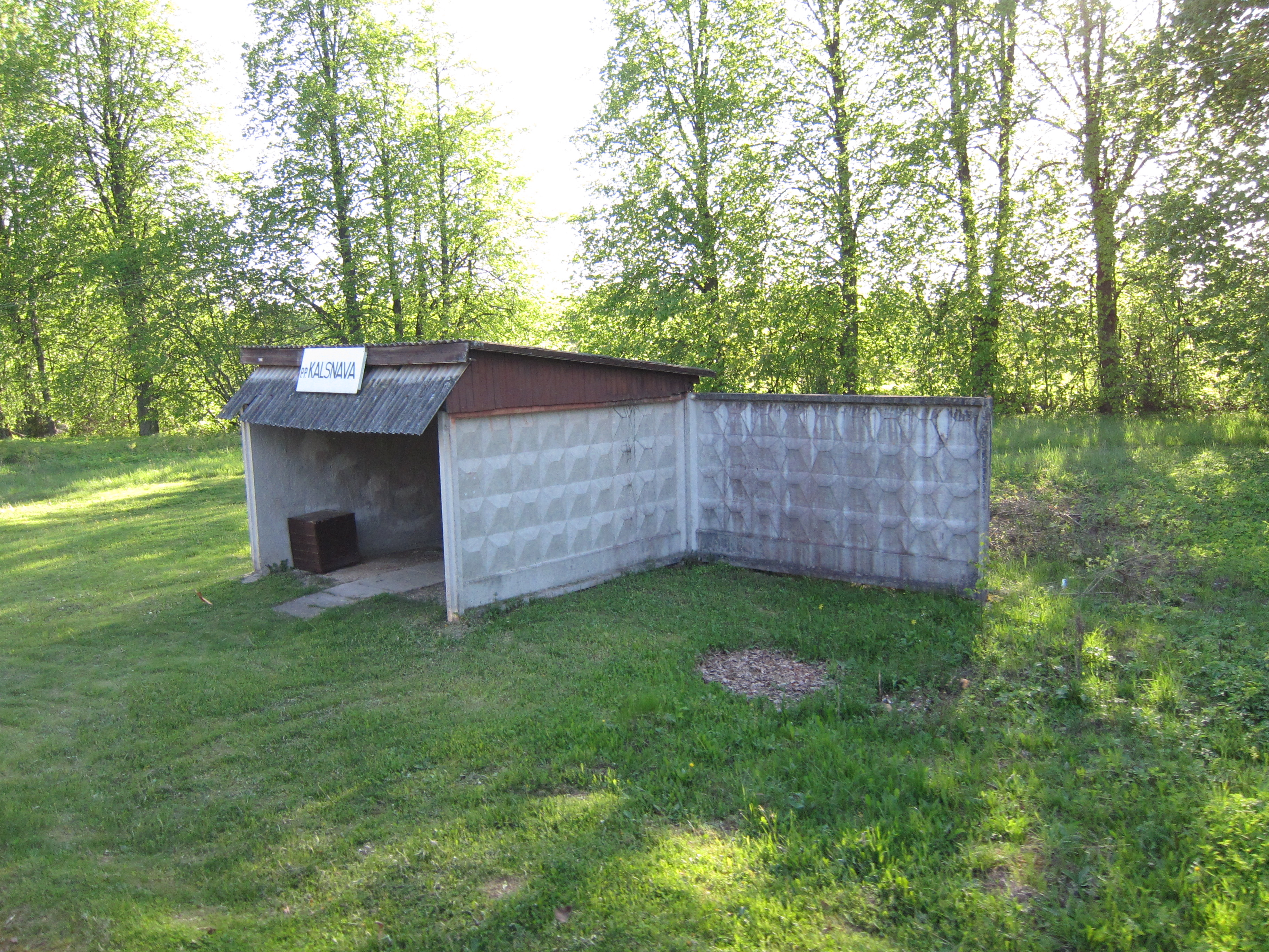 Nojume Kalsnavas dzelzceļa pieturā.